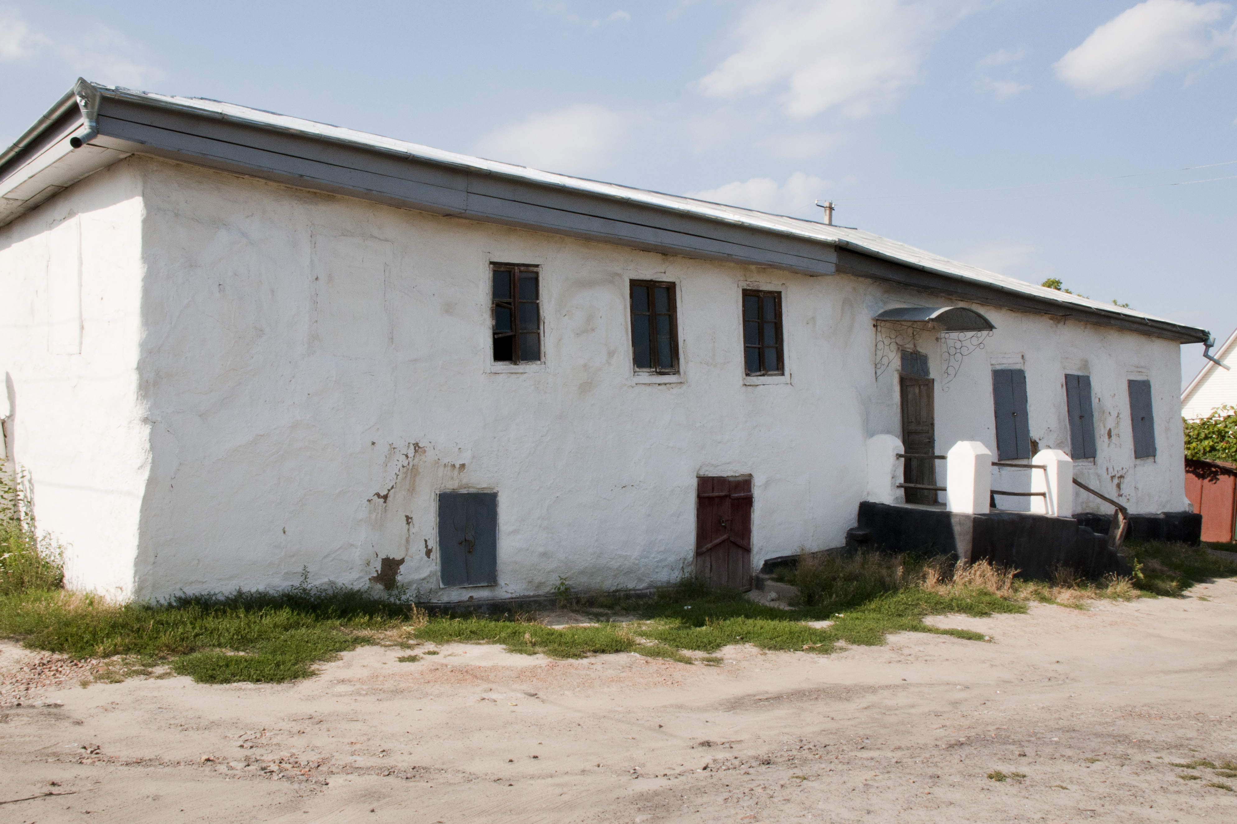 Синагога у Бершаді, Бершадь, Вінницька область